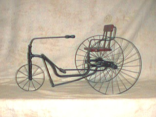 velocipede from 1880 (tiller's)